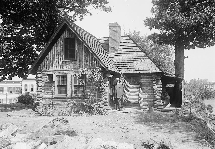 Poet Miller cabin